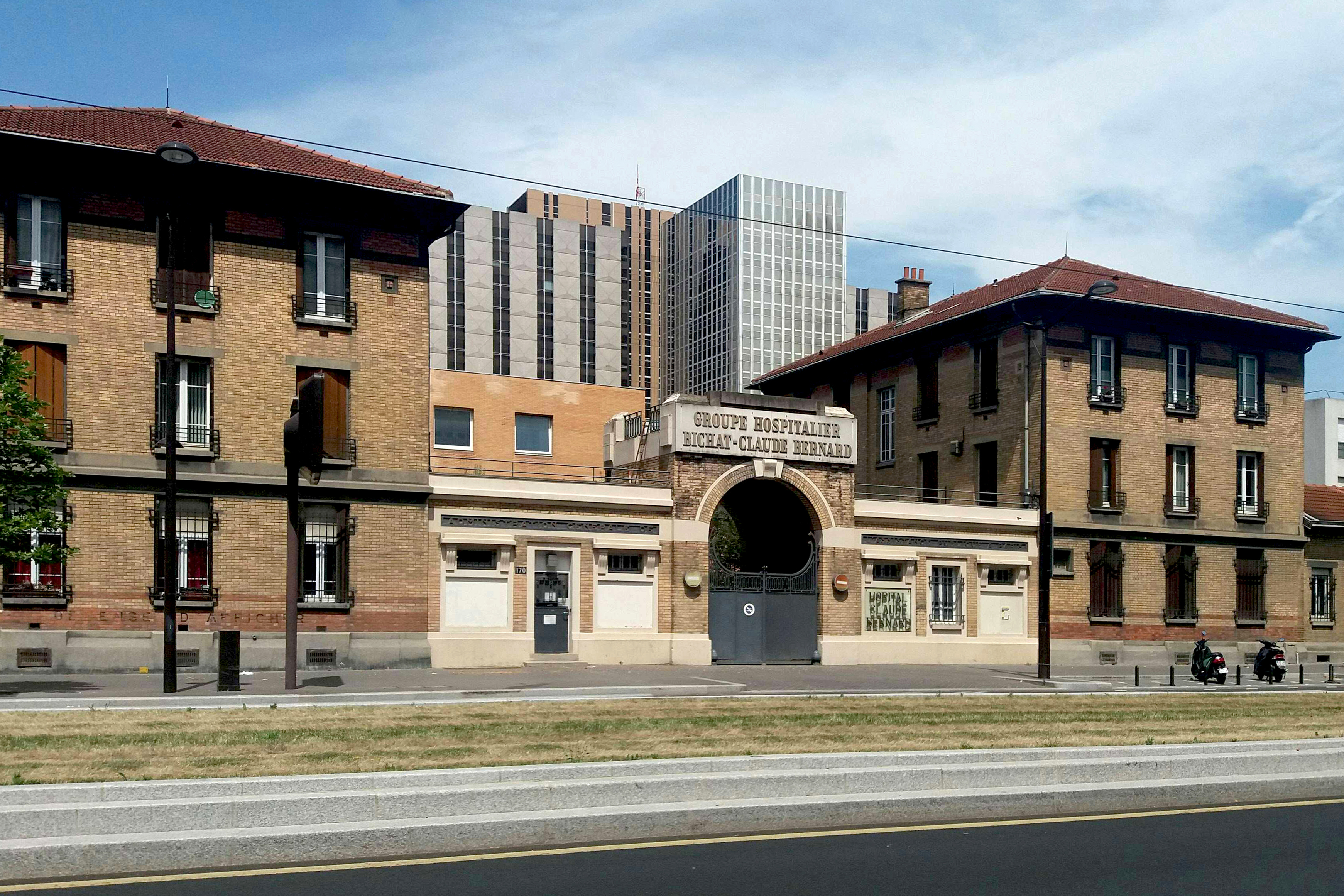 L'hôpital Bichat-Claude-Bernard (AP-HP) vue depuis le boulevard Ney